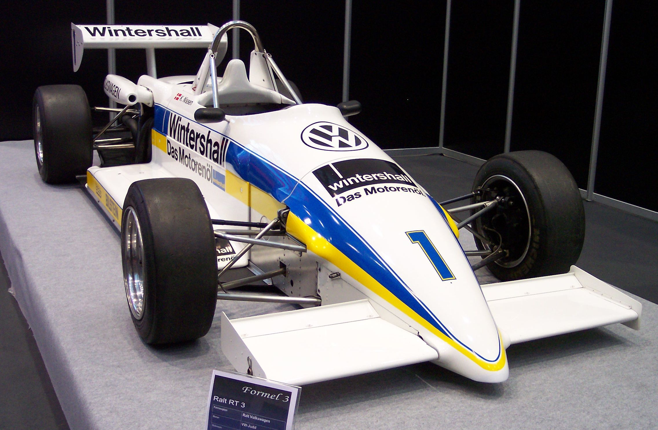 Description: Ralt RT 3 1986 Kris Nissen Formula 3 Source: Eigenes Bild